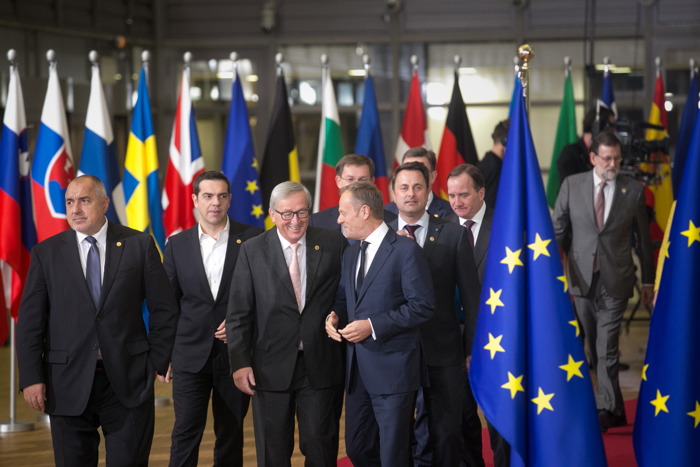 Photo: Tauno Tõhk (EU2017EE)